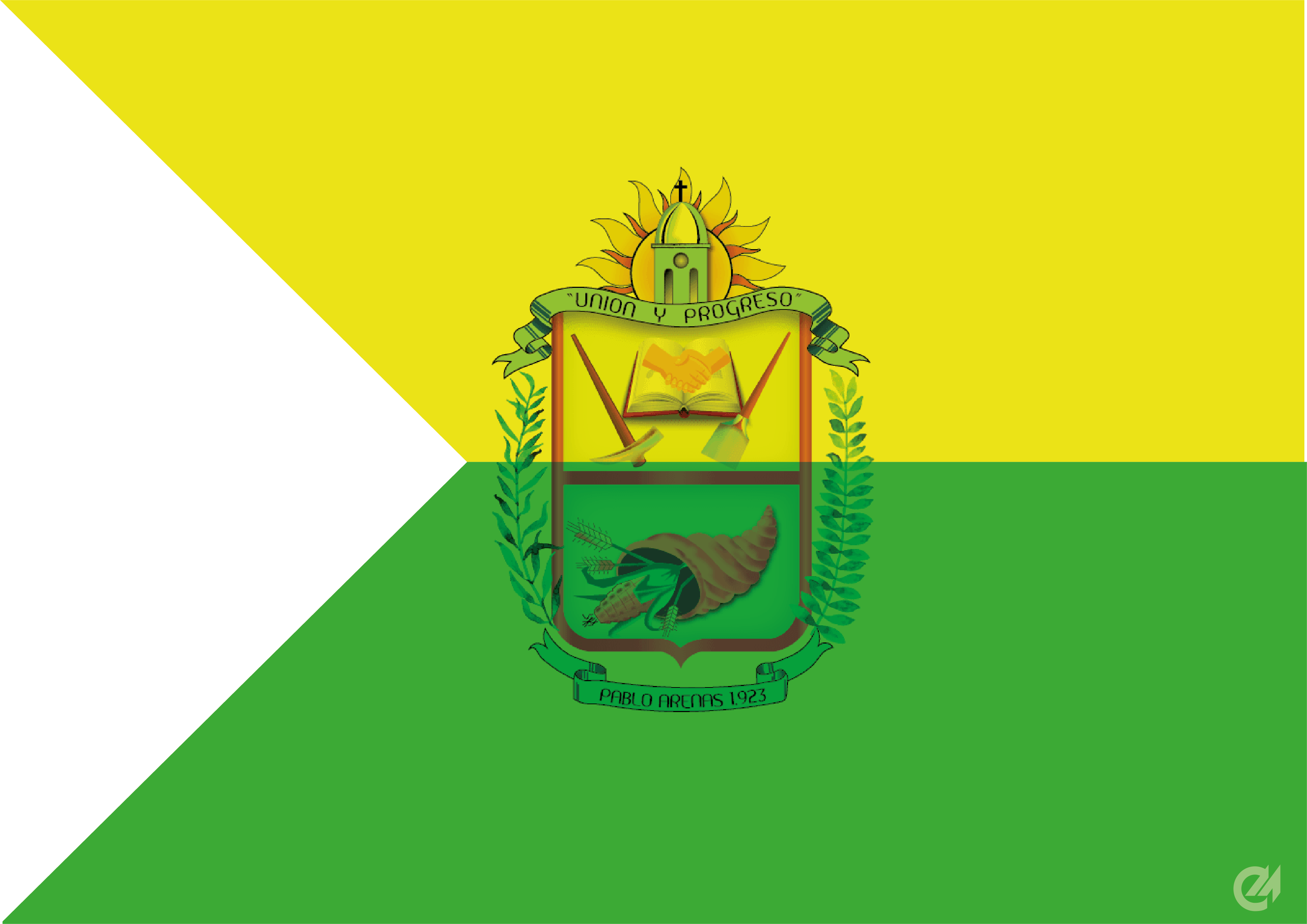 Idea y Diseño: Señor Lázaro Ruiz Colaboración especial de: Comité de la XII fiesta del Maíz Sra. Inés Galarraga y Profesor Julio Vivero.